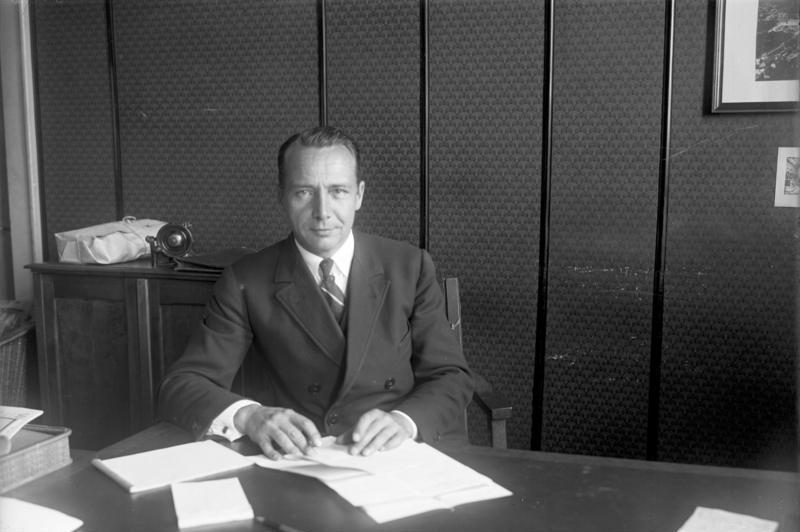 Dr. Eckener will die Luftschiff-Führung des "Graf Zeppelin" abgeben. Kapitän Lehmann, der voraussichtliche Nachfolger Dr. Eckener, soll künftig die Zeppelin-Luftschiffe führen.